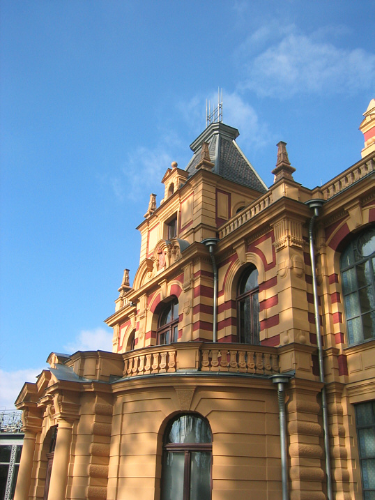 Augsburg, Germany: Parktheater Göggingen (Kurhaus)